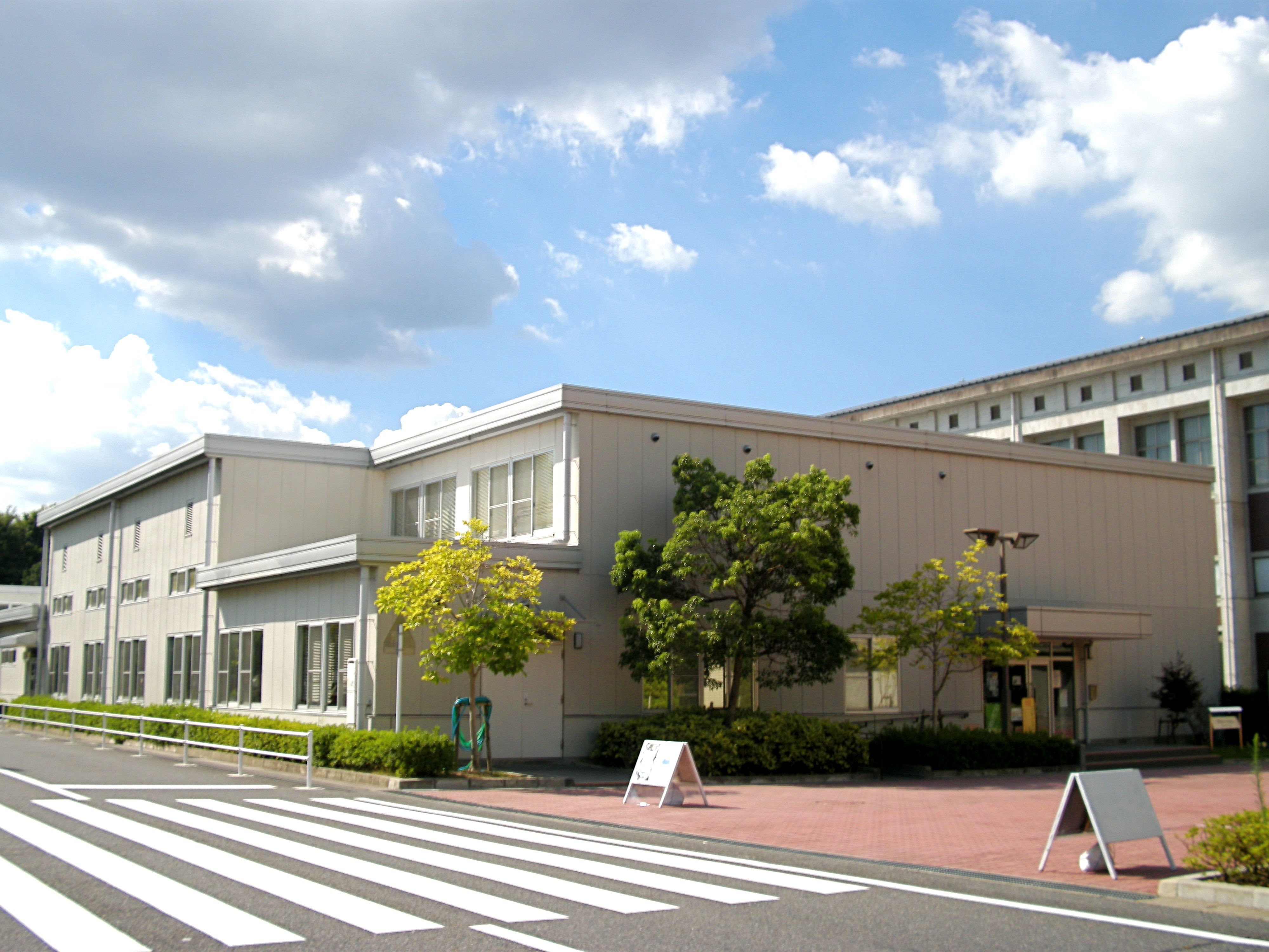 BKC Athlete Gym (Biwako Kusatsu Campus, Ritsumeikan University, Shiga, Japan)